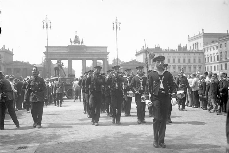 Marine-Ehrenwache vor Hindenburg's Palais! Zur Erinnerung an den Tag der Skagerrak-Schlacht zieht eine Marine-Ehrenwache, welche vom Flotten-Kommando Kiel gestellt wird, vor das Reichspräsidenten-Palais in Berlin auf. Die Marine-Ehrenwache zieht unter Vorantritt der Marine-Kapelle durch das Brandenburger Tor zum Palais des Reichspräsidenten.